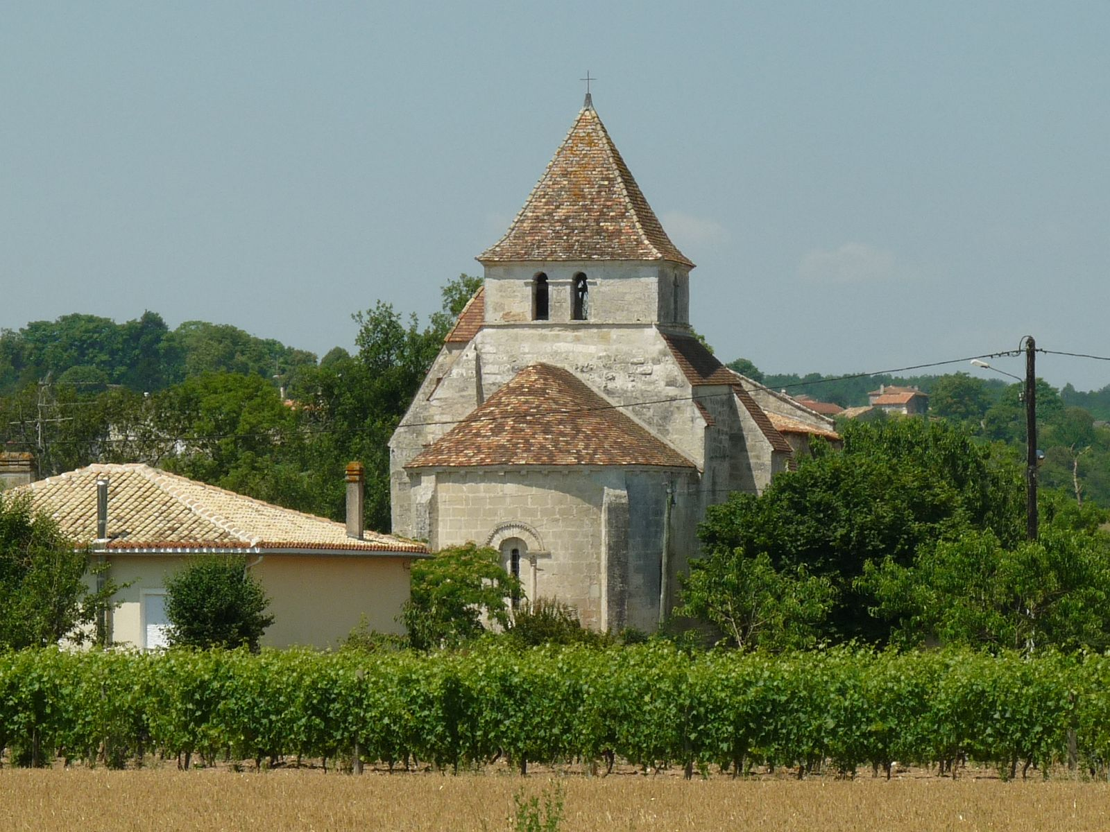 église de Balzac, Charente, France